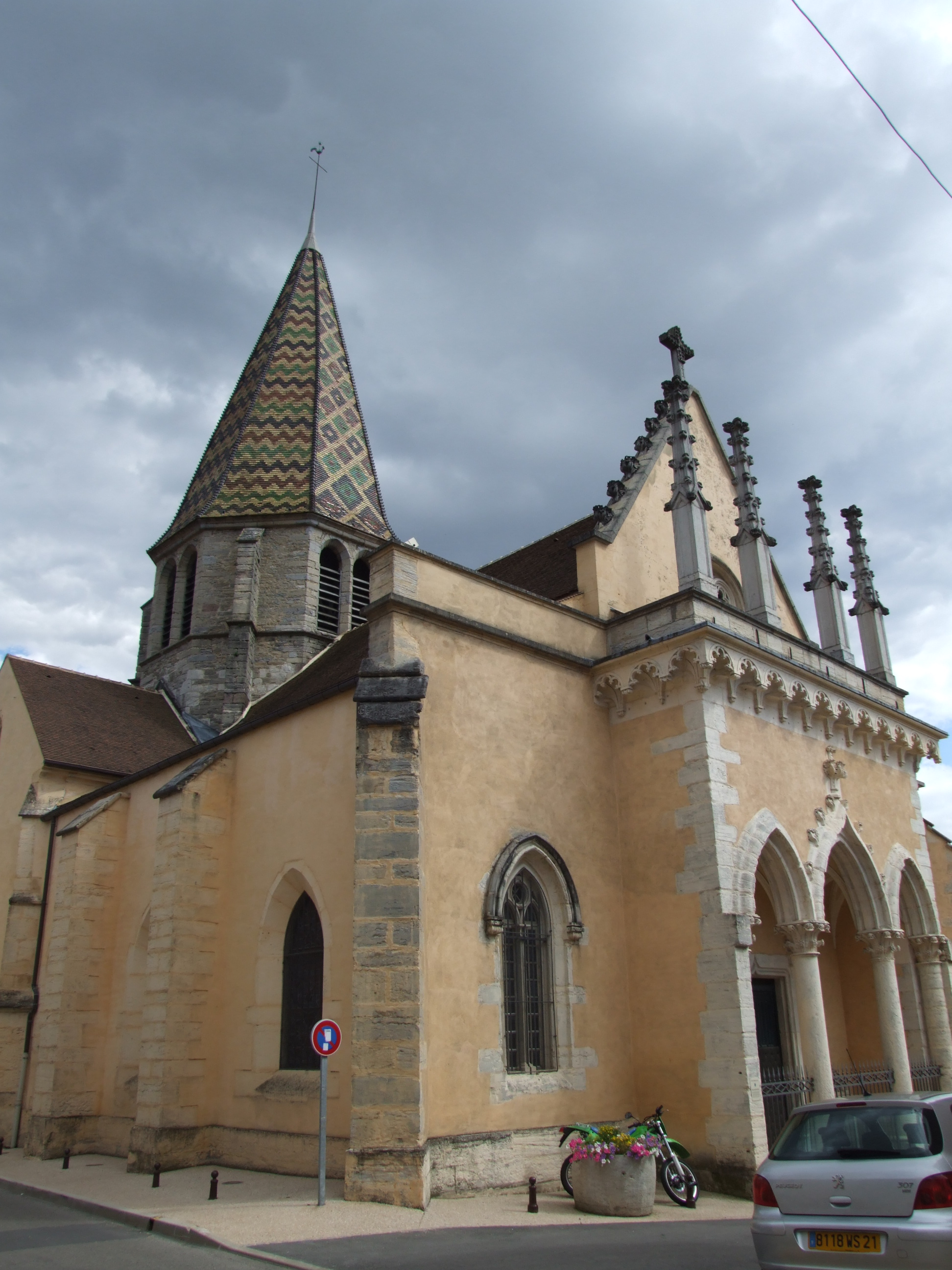 Église Saint-Baudèle de Plombières-lès-Dijon, Plombières-lès-Dijon, Côte-d'Or, Bourgogne, FRANCE